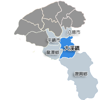 桃園縣大溪鎮行政區劃。